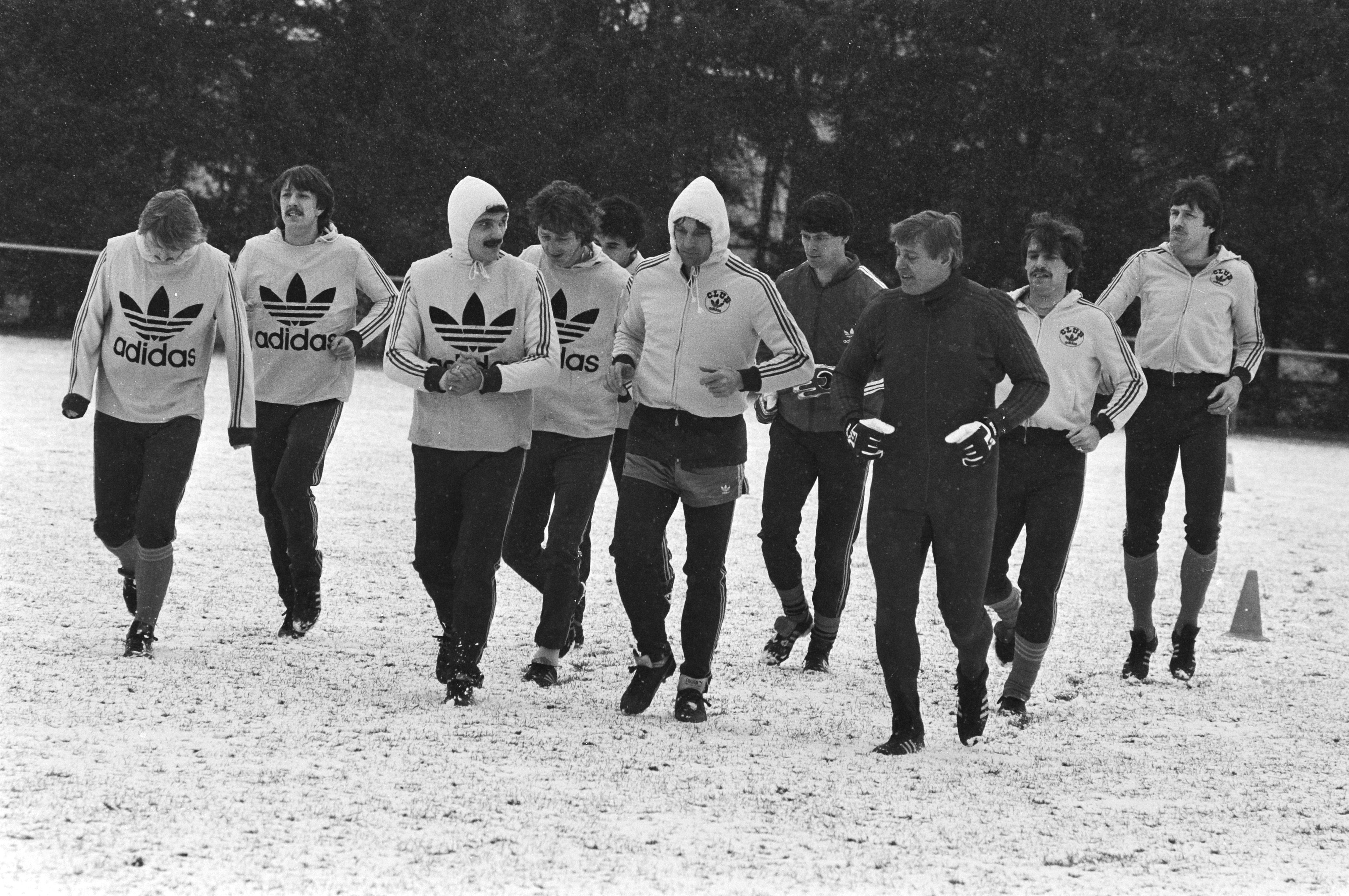 Collectie / Archief : Fotocollectie Anefo Reportage / Serie : Training van het Nederlands elftal in Zeist voor de interland tegen Spanje Beschrijving : V.l.n.r. Koolhof, Wijnstekers, Van de Korput , Hovenkamp, Vanenburg, Krol, Metgod, Schrijvers, Van der Gijp en Spelbos Datum : 8 februari 1983 Locatie : Utrecht (prov), Zeist Trefwoorden : sport, sporttrainingen, voetbal Persoonsnaam : Gijp, René van der, Hovenkamp, Hugo, Koolhof, Jurrie, Korput, Michel van de, Krol, Ruud, Metgod, Edward, Schrijvers, Piet, Spelbos, Ronald, Vanenburg, Gerald, Wijnstekers, Ben Fotograaf : Bogaerts, Rob / Anefo Auteursrechthebbende : Nationaal Archief Materiaalsoort : Negatief (zwart/wit) Nummer archiefinventaris : bekijk toegang 2.24.01.05 Bestanddeelnummer : 932-4944